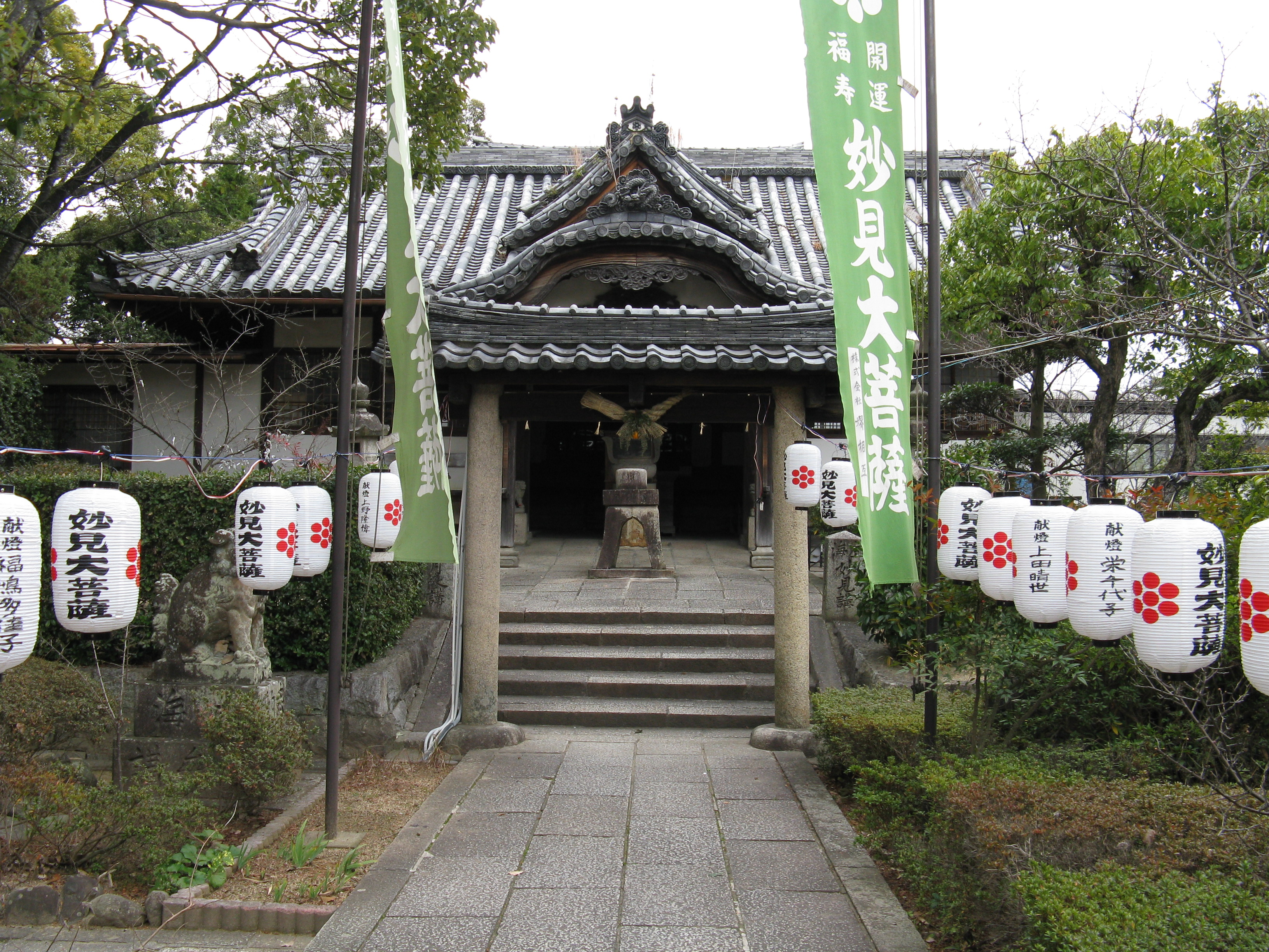 感応寺